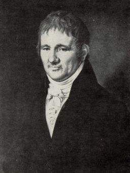 archeolog Matyáš Kalina z Jähensteinu